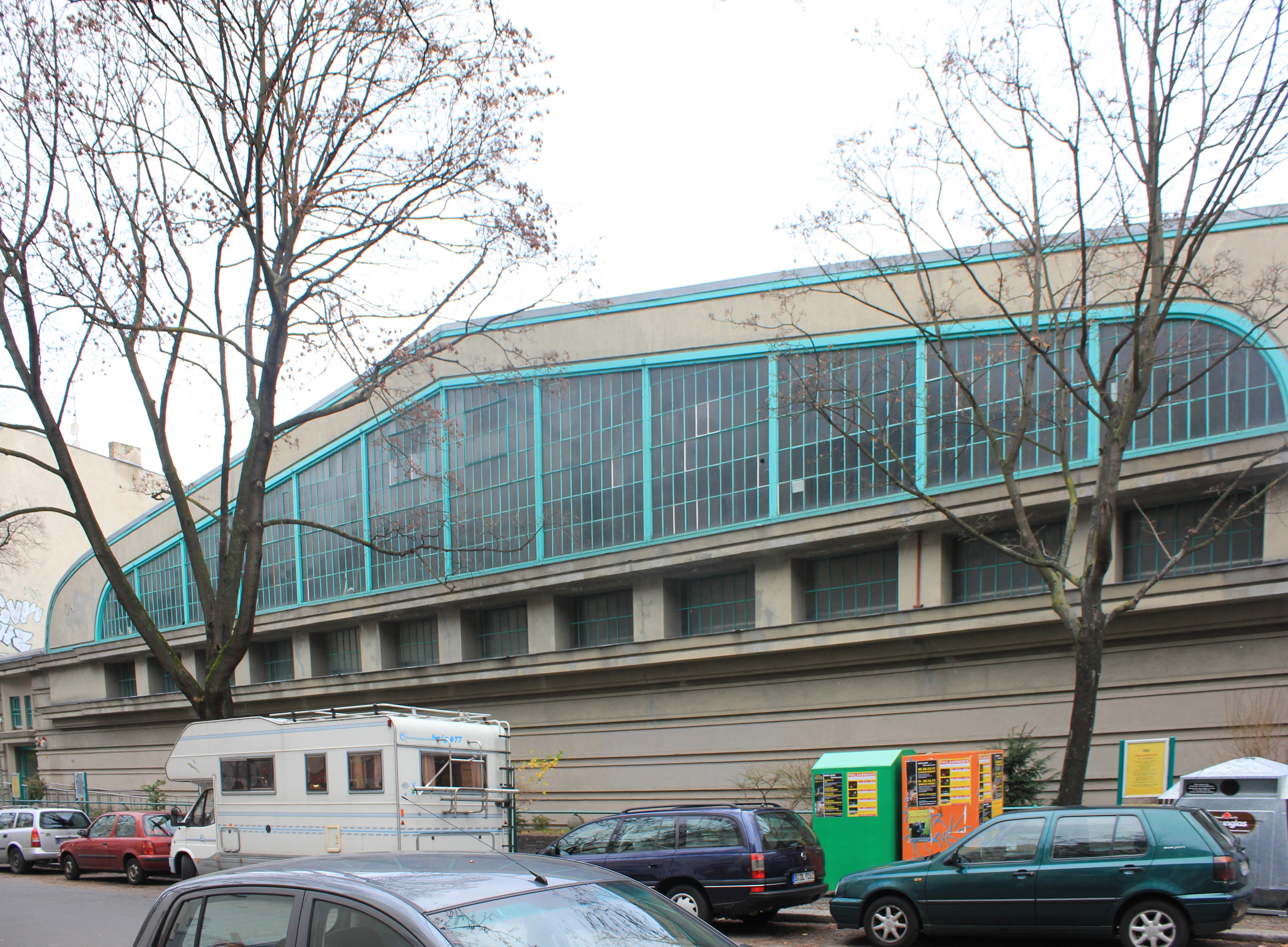 Straßenbahndepot 1924-25 von Jean Krämer